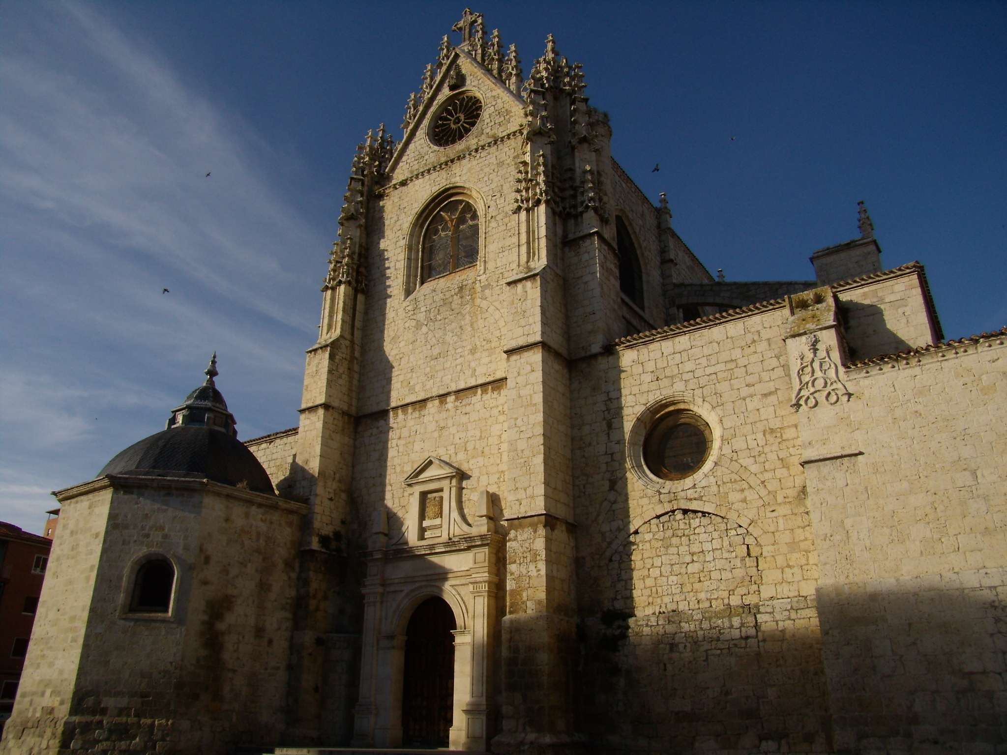 Fachada de la Catedral de Palencia, desde la Plaza de San Antolín.